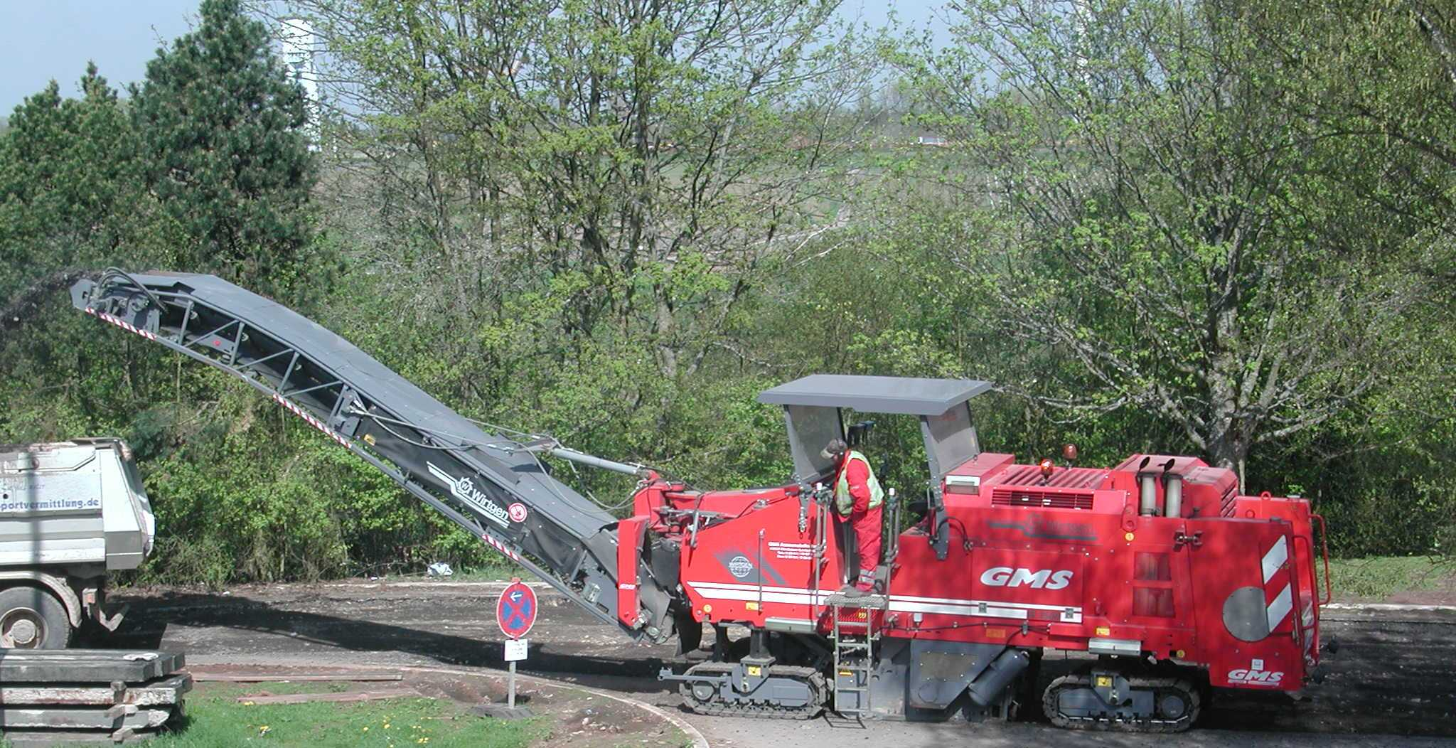 Asfaltfræser i Tyskland. Denne model kan med transportbåndet læsse asfaltfræset direkte op i en lastbil eller vogn, selvom der altid ryger lidt ved siden af